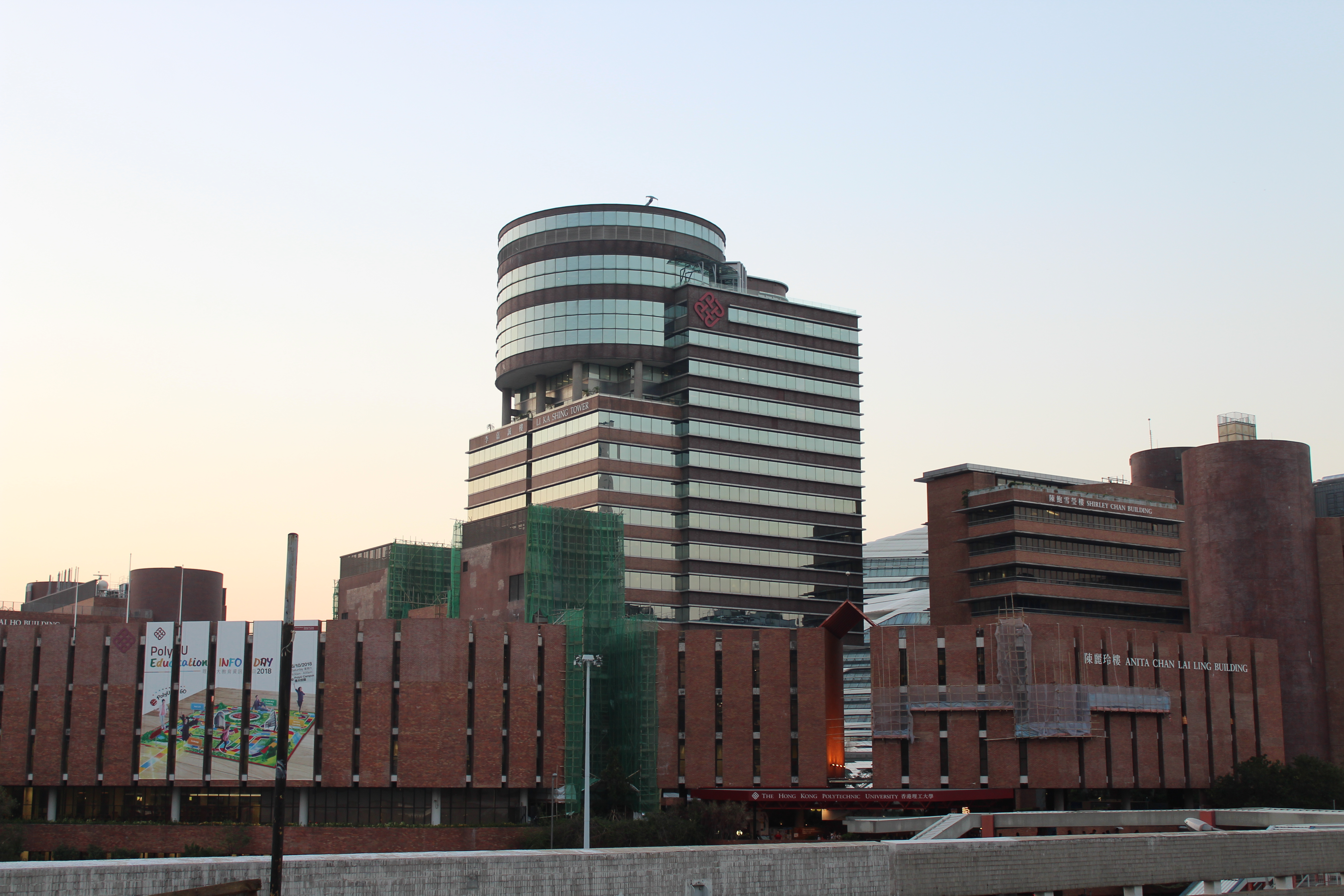 Université Polytechnique de Hong Kong (PolyU). Photographie prise en octobre 2018.